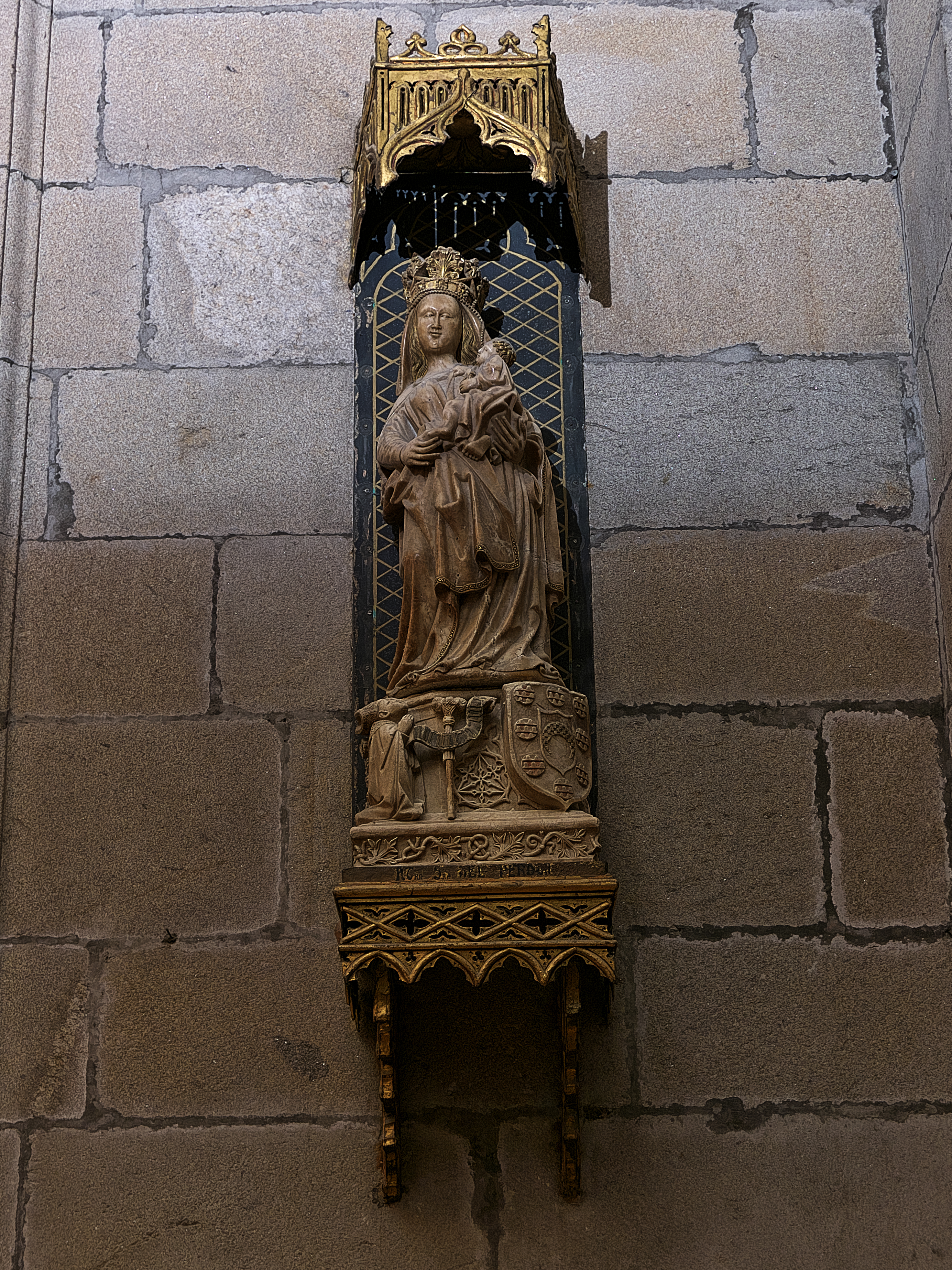 Antecapilla de la Capilla de Lope de Mendoza, Catedral de Santiago de Compostela. Capilla funeraria patrocinada por el sevillano, arzobispo de Santiago de Compostela, Lope de Mendoza (†1445). Imagen gótica de alabastro.